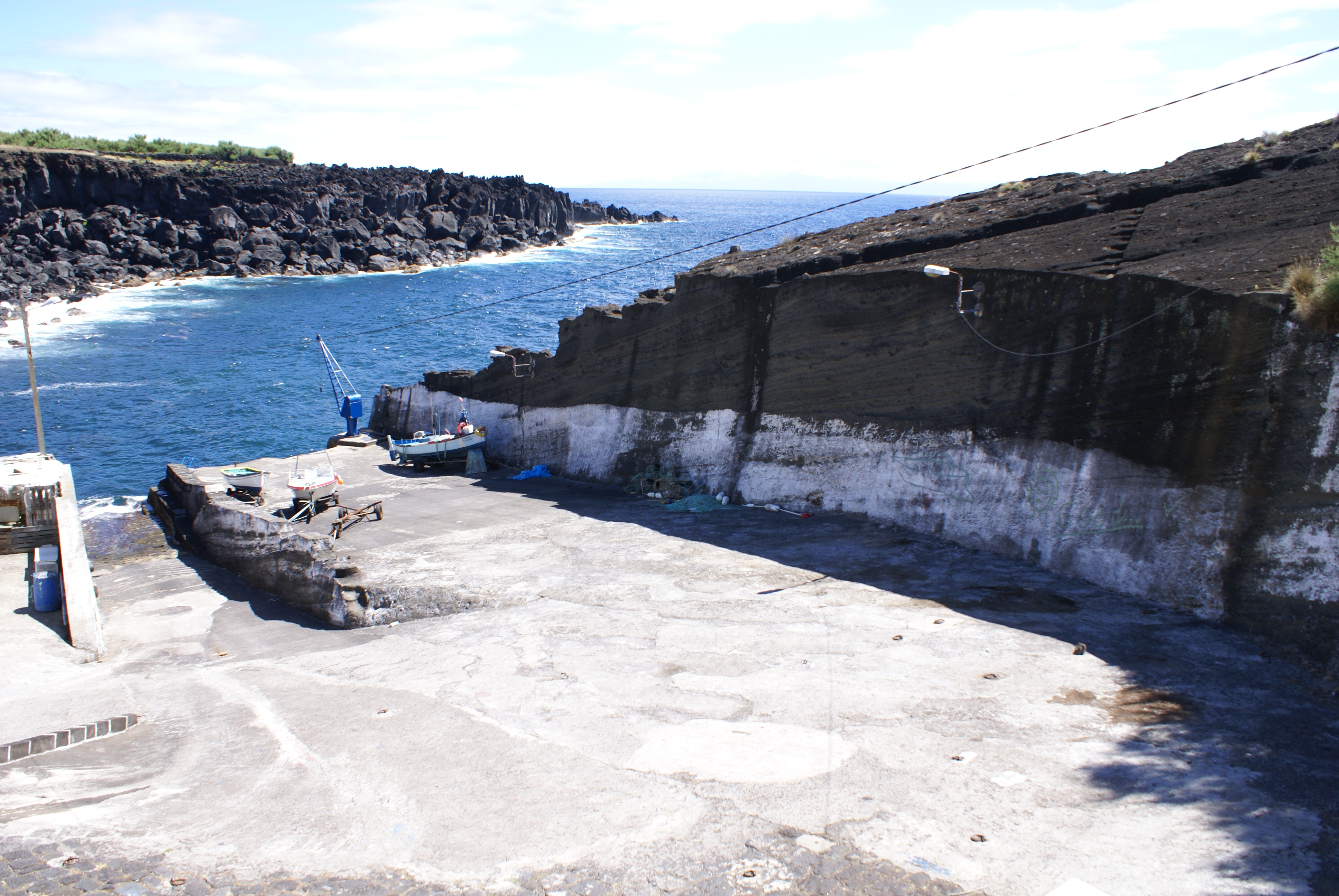 Porto piscatório da Baía da Folga, vista parcial, Santa Cruz da Graciosa, ilha Graciosa, Açores, Portugal